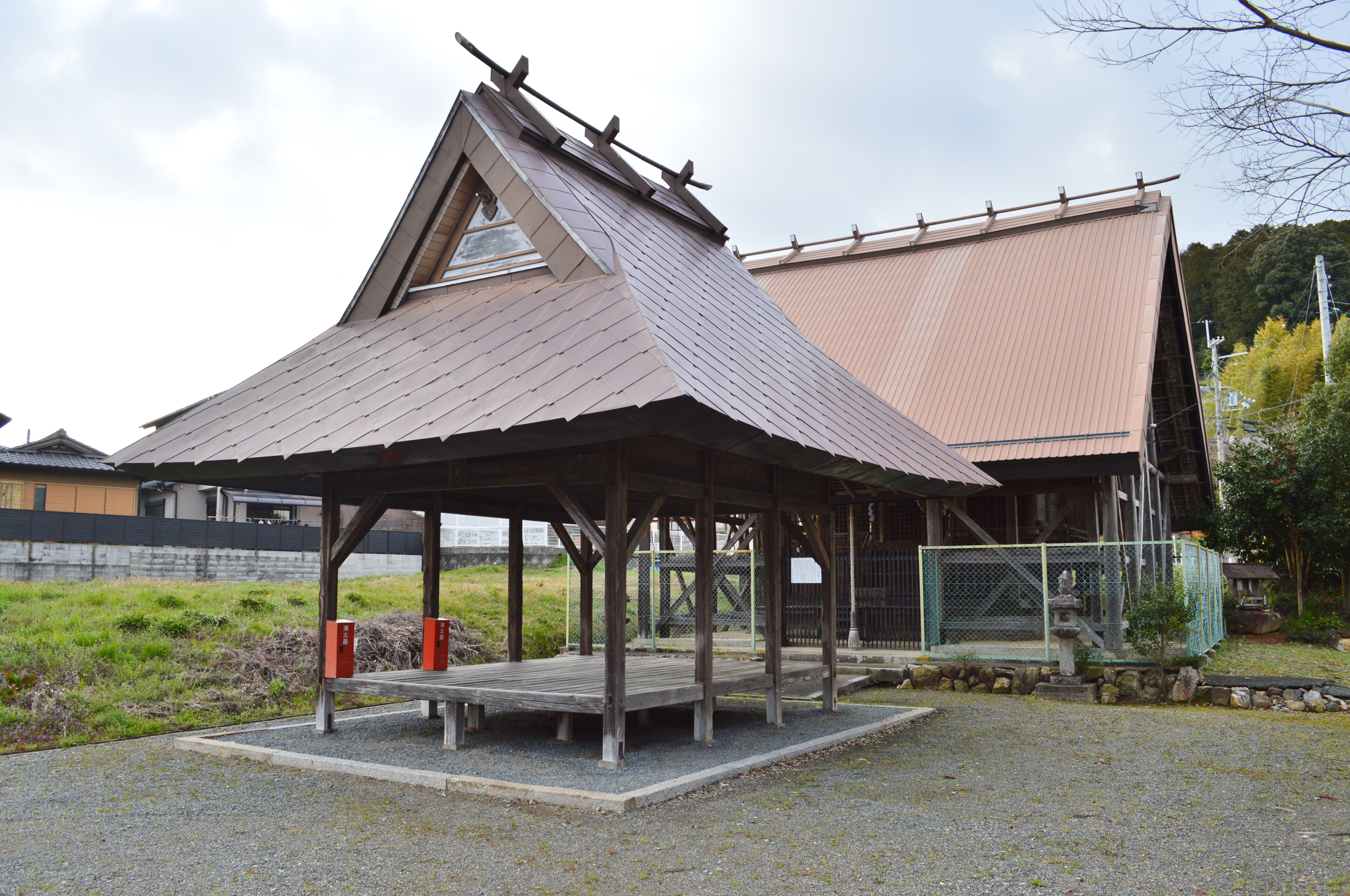 城崎神社 社殿 Nikon D3200